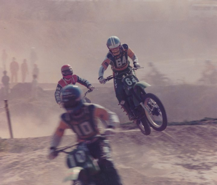 1970年代後半